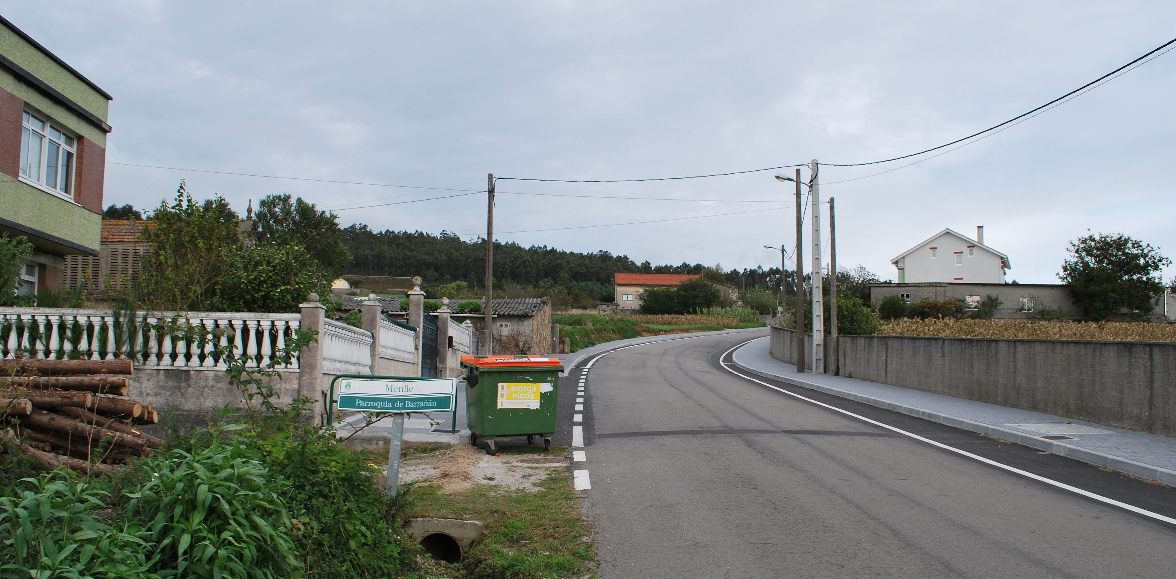 Vista de Nemlle Barrañán Arteixo A Coruña Galiza Spain